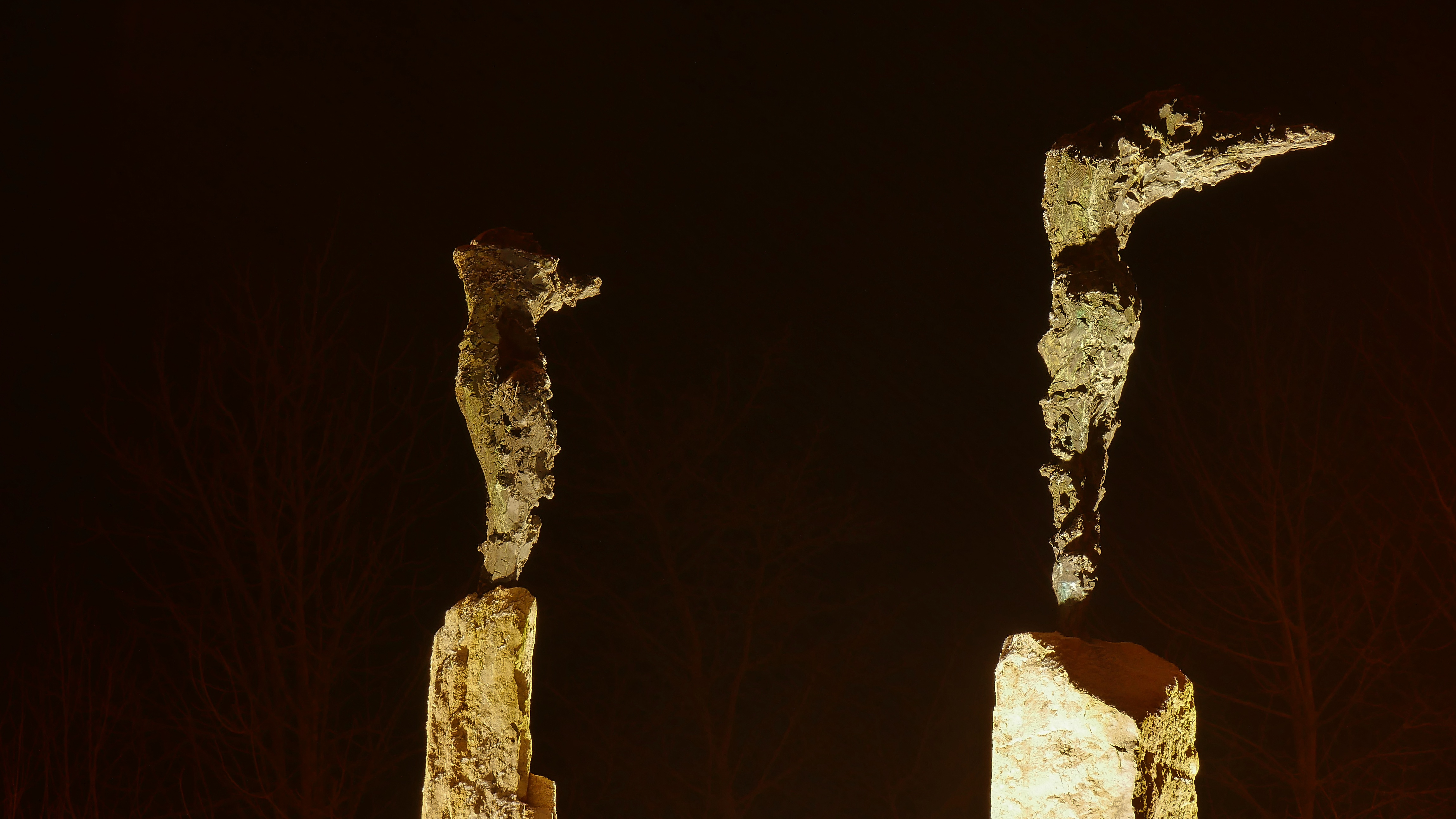 Kunst im Kreisverkehr in Konz (Germany, Rhineland-Palatinate) Kreisverkehr an der Umgehungsstraße bei Möbel Martin, Bronzeplastiken zweier Tänzer auf 3 m hohen hellen Felsen aus einem nahe gelegenen Steinbruch.